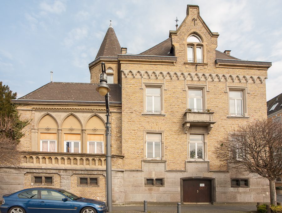 Denkmalgeschützte Villa (erbaut 1883), Von-Weiß-Straße 8 (Ecke Rheinallee), Königswinter